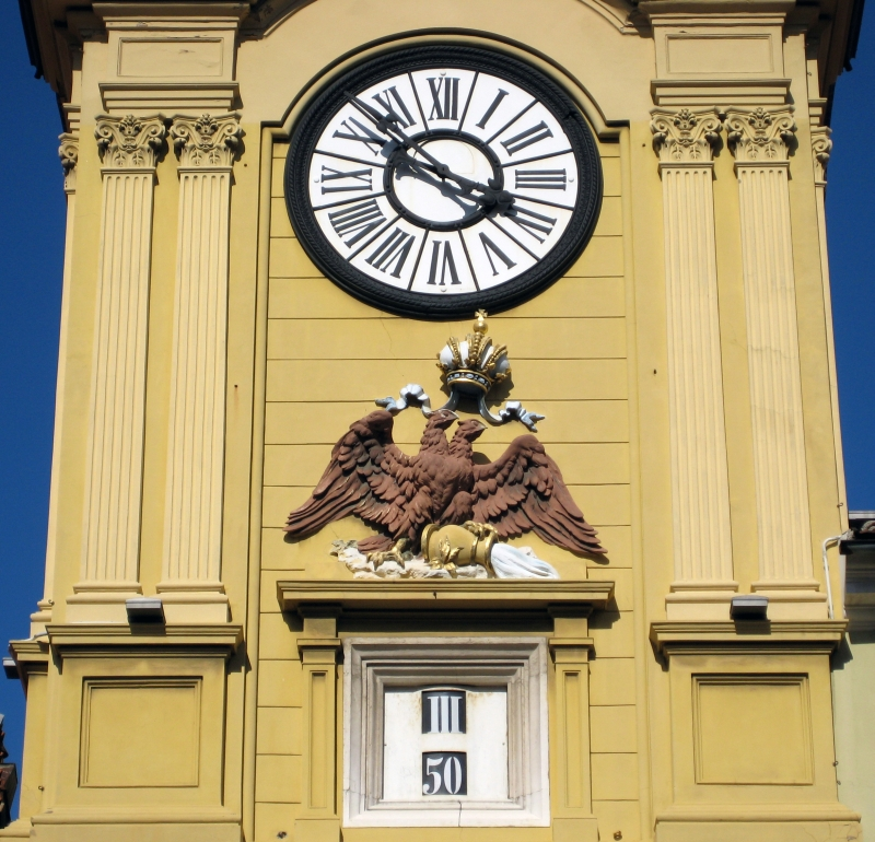 Gradski toranj na kojeg se u 17. stoljeću dodaju dekorativni elementi, grbovi, portreti vladara iz habsburške dinastije. Ispod grba, (dodijeljenog 6. lipnja 1659) je dvoglavi orao s obje glave okrenute na istu stranu, koji stoji na posudi iz koje teče voda u more, je deviza IDEFICIENTER, što znači nepresušivo, a uz bistu cara Leopolda I. postavljena je i bista Karla VI., koji je grad Rijeku 18. ožujka 1719. godine proglasio slobodnom lukom.